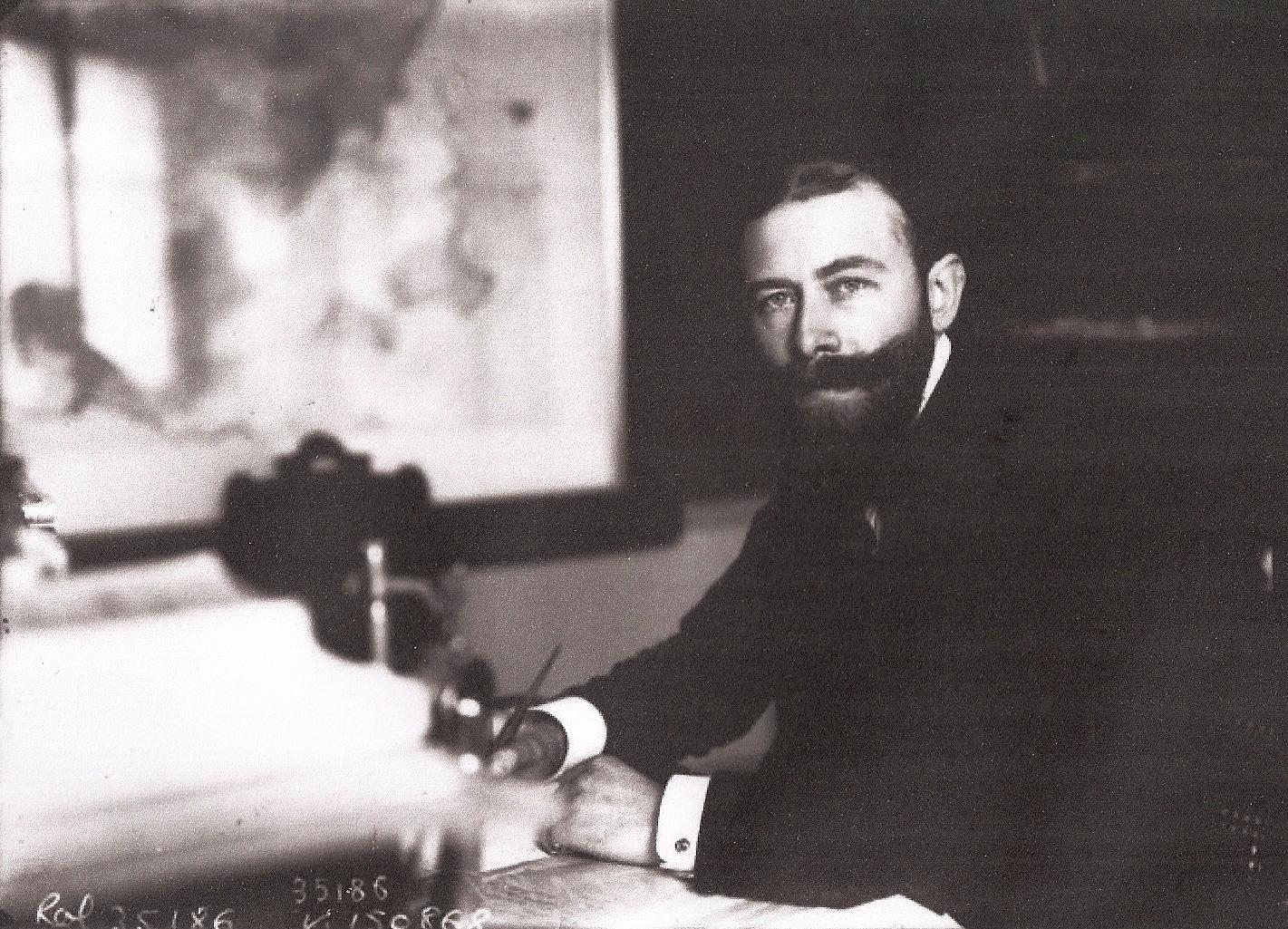 Charles Simon (1882-1915), secrétaire général de la Fédération gymnastique et sportive des patronages de France (FGSPF), fondateur du Comité français interfédéral (CFI), à son bureau au siège de la FGSPF, place Saint-Thomas d'Aquin.